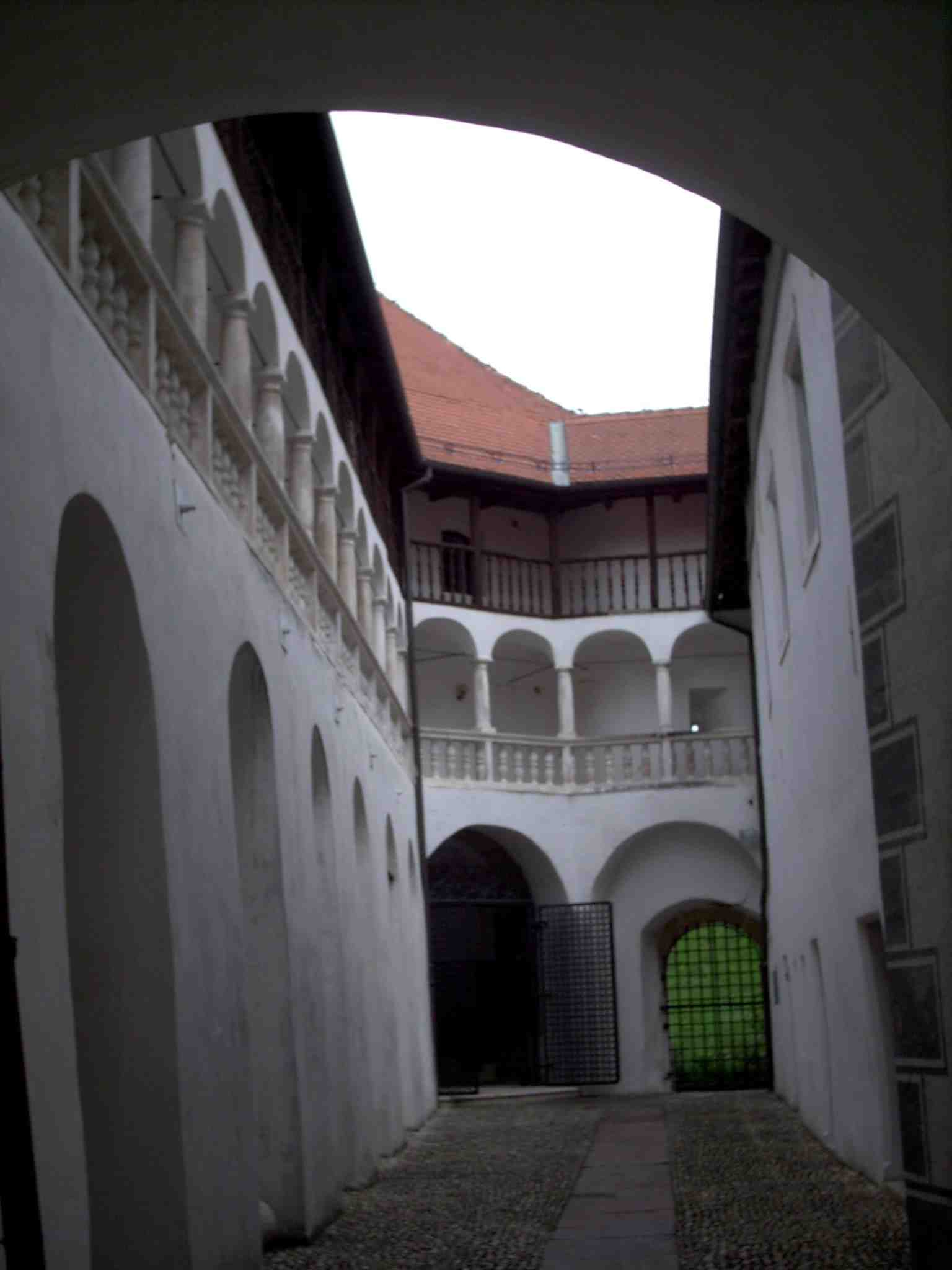 Schloss-Varazdin-Innenansicht